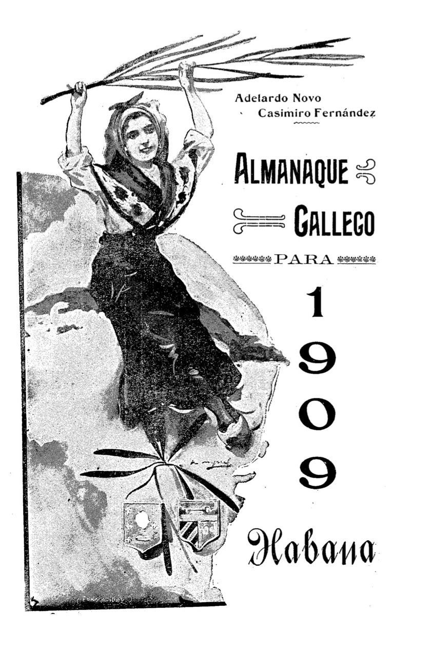 Portada do Alamanaque Gallego para 1909 editado por Adelardo Novo e Casimiro Fernández na Habana